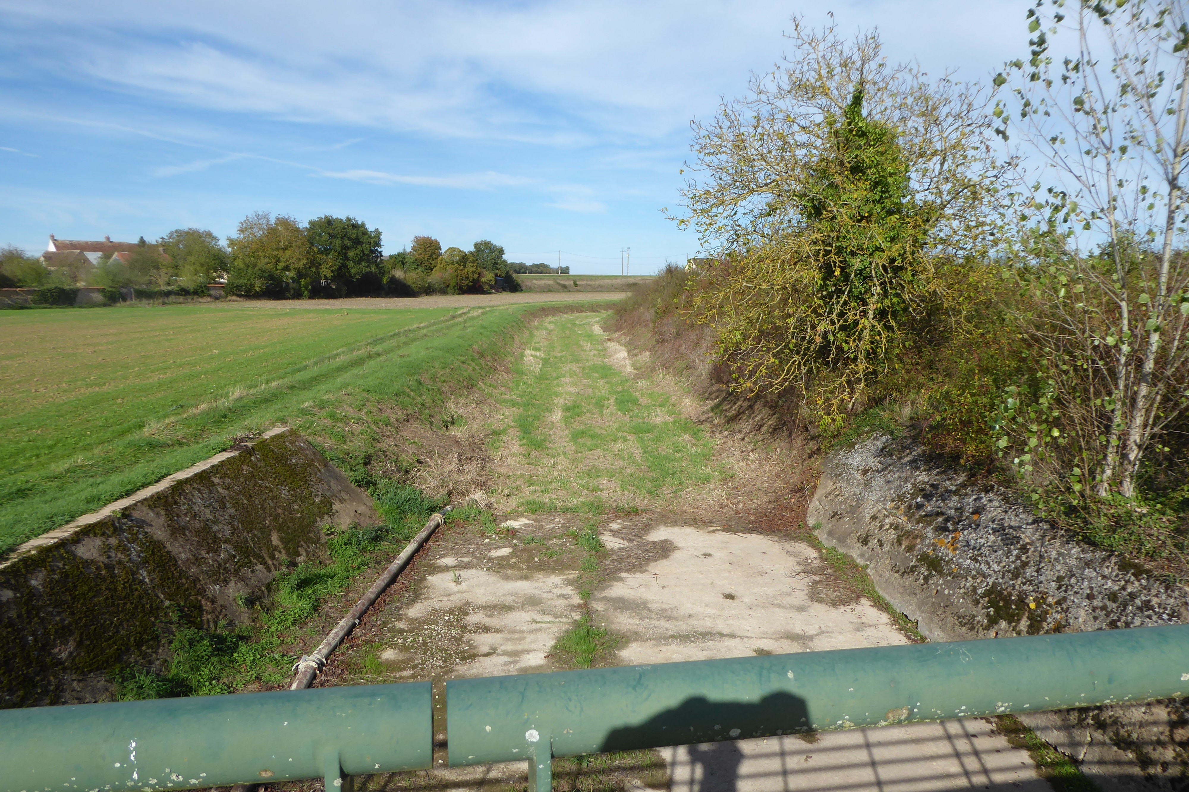 Vallée de Paray ou de la Malorne, affluent du Loir, à Saint-Germain-lès-Alluyes, Eure-et-Loir, France.